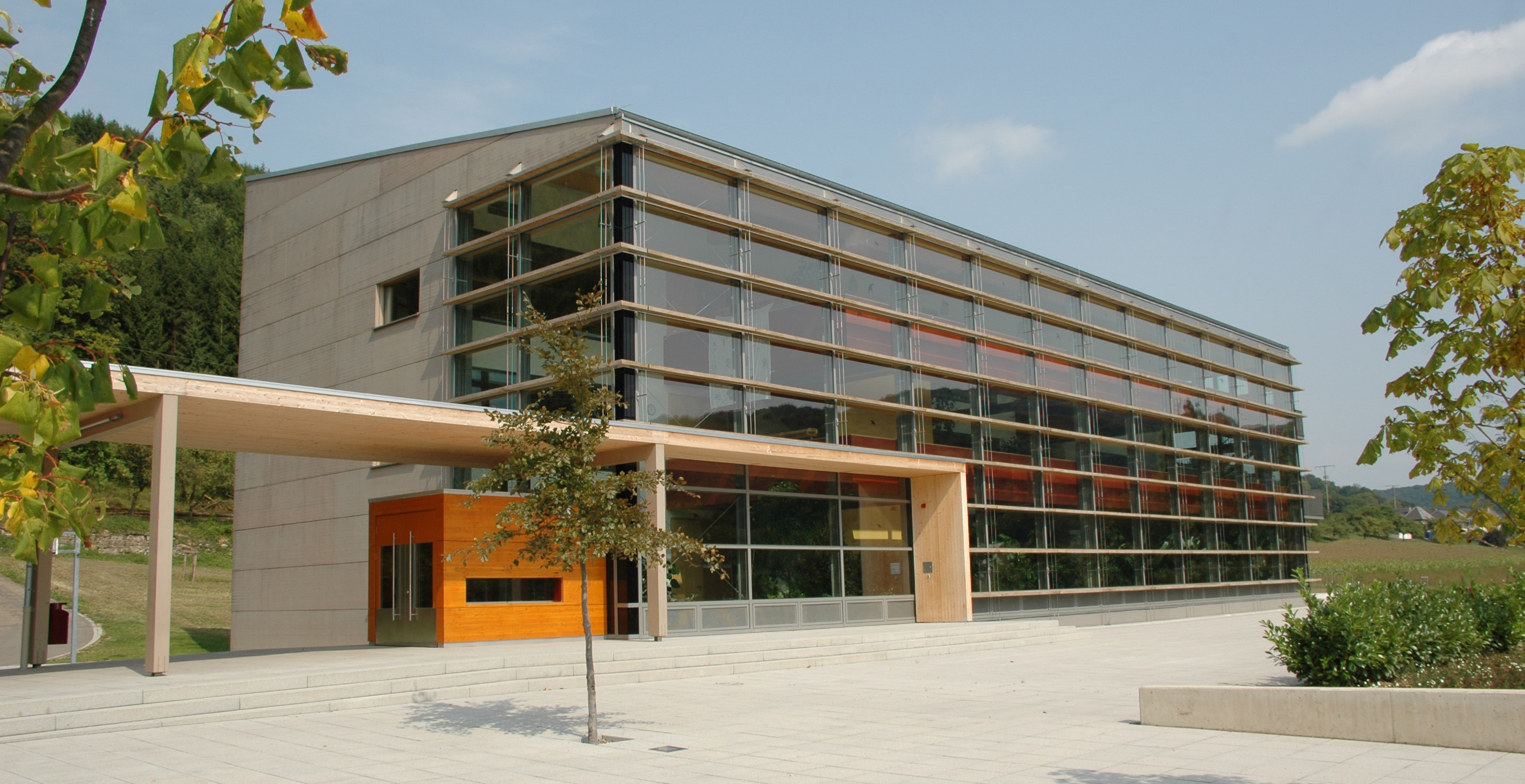 Sujet:Bur (Mompech) Nei Schoul